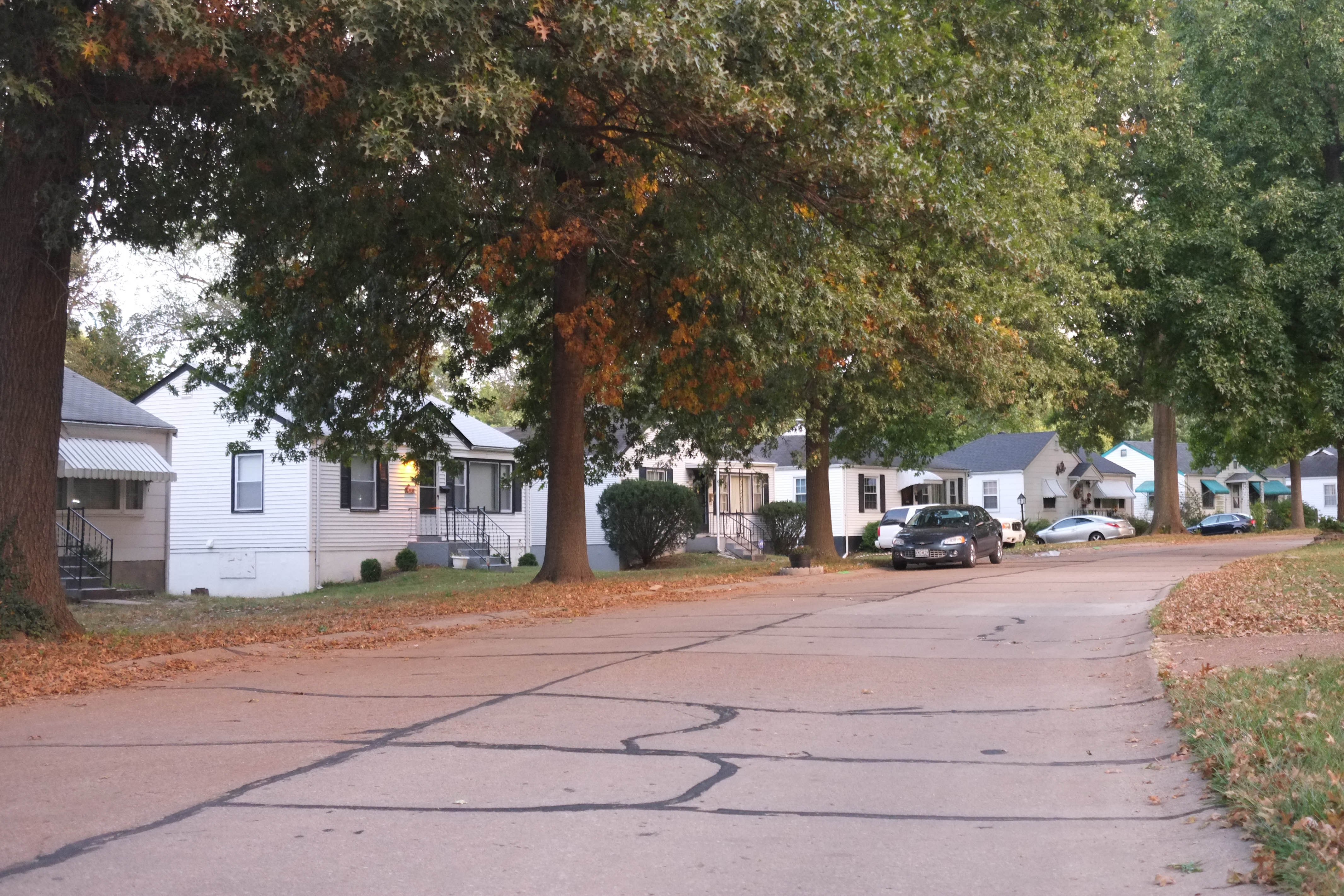 Hanley Hills